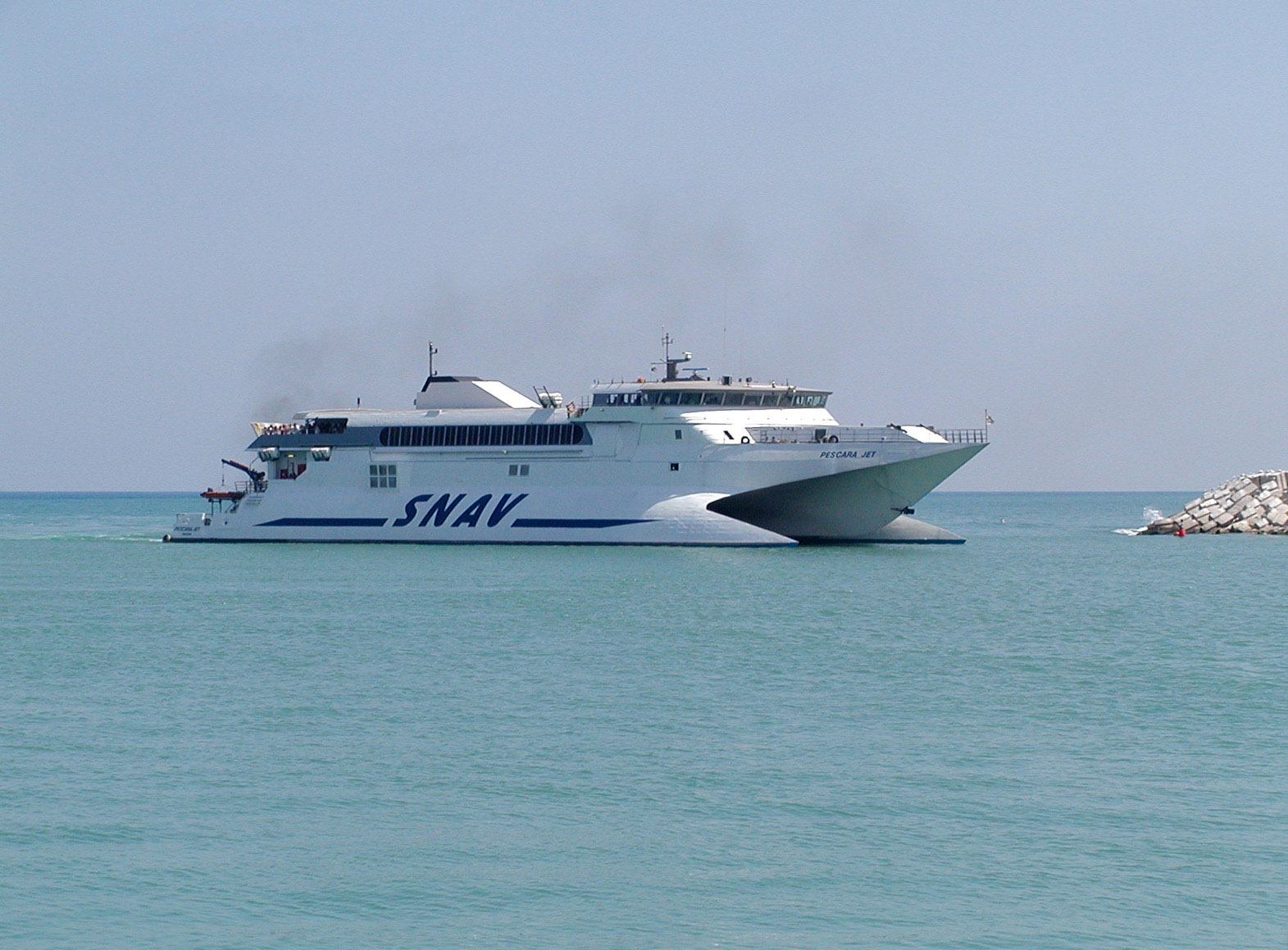 Die Fähre "Pescara Jet" trifft ein